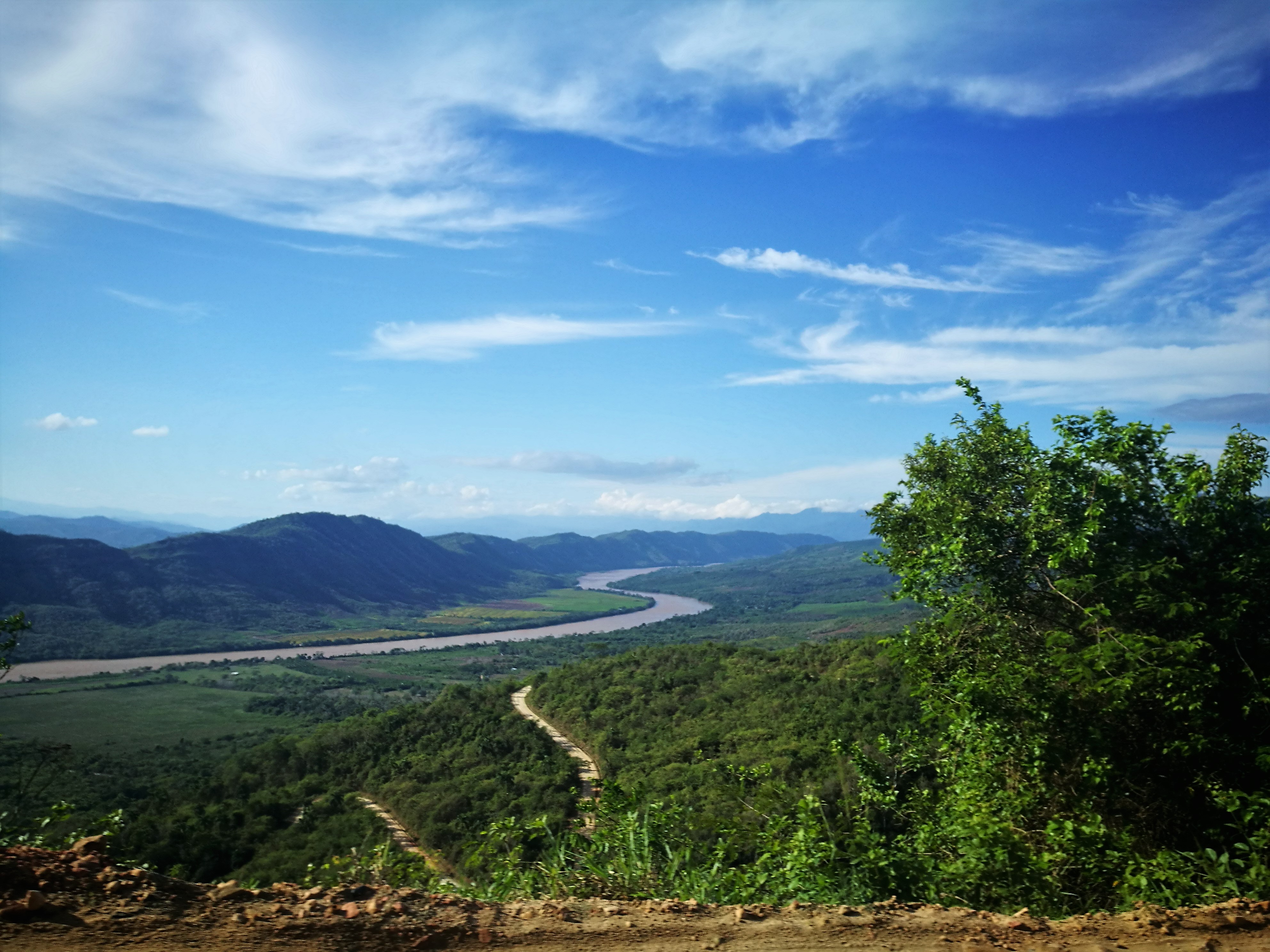 Riu Huallaga des de la carretera de Sauce